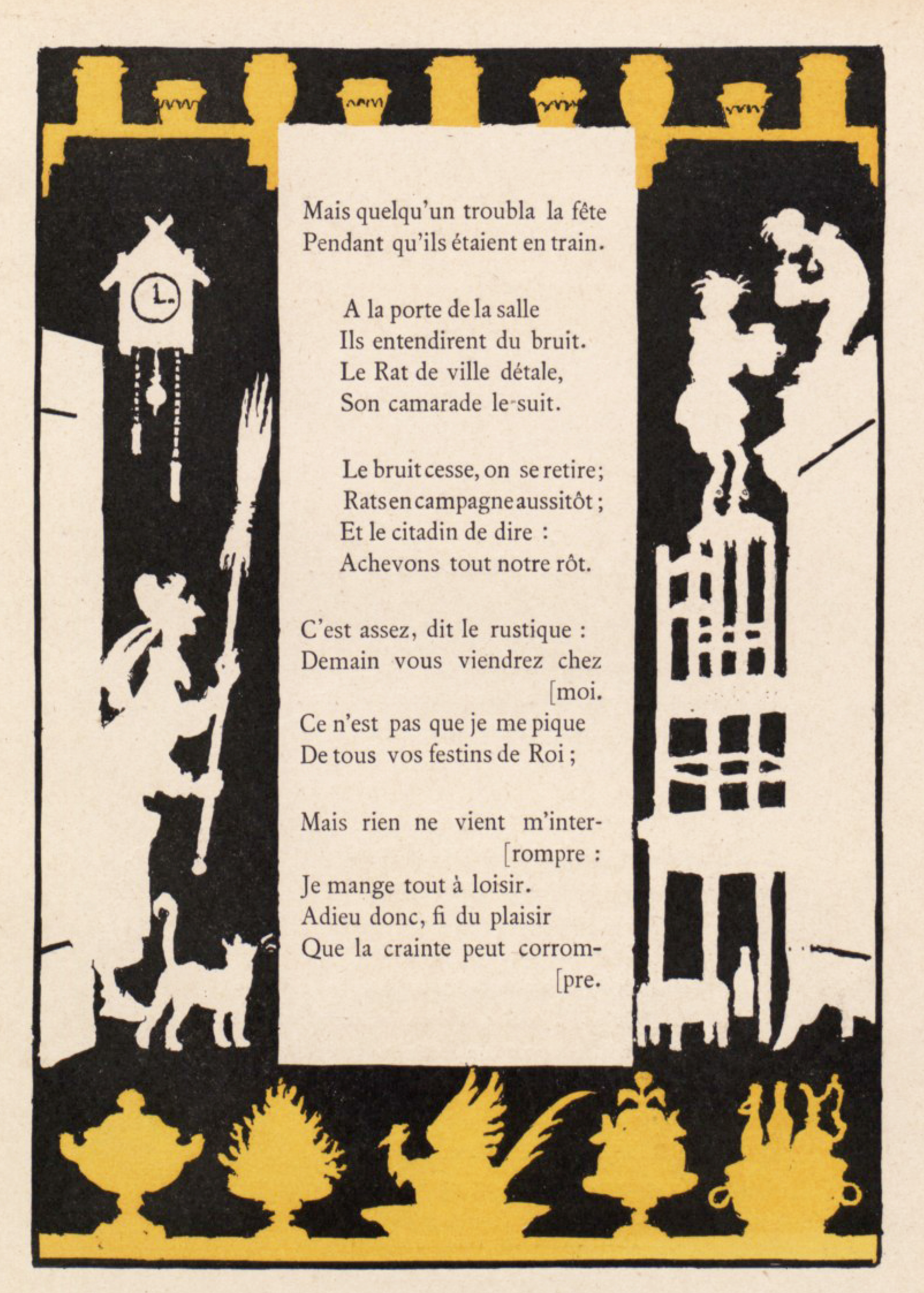 Dessin réalisé par Henri Avelot représentant la fable Le Rat de ville et le Rat des champs de Jean de La Fontaine et extrait du livre " Dix fables d'animaux, illustrations en silhouettes humoristiques aux dépens des humains " (Paris, édition Henri Laurens, 1932).